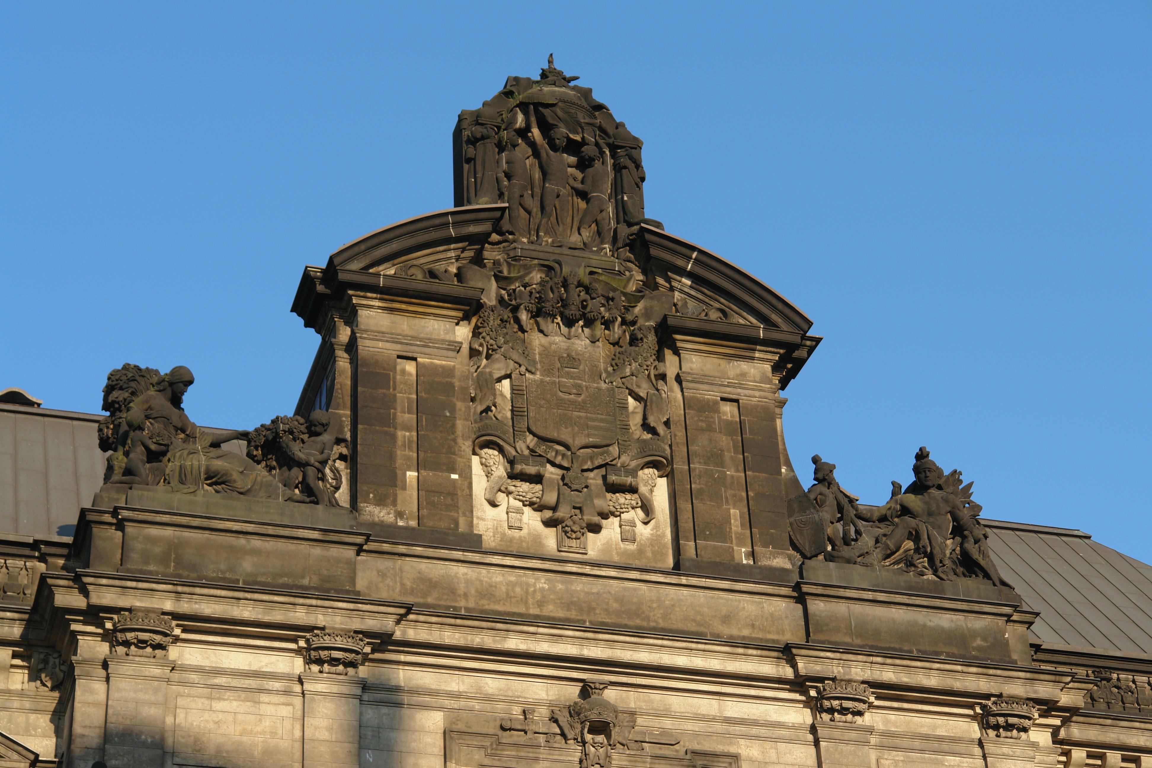 Giebel des Säschsische Ständehauses (Oberlandesgericht)